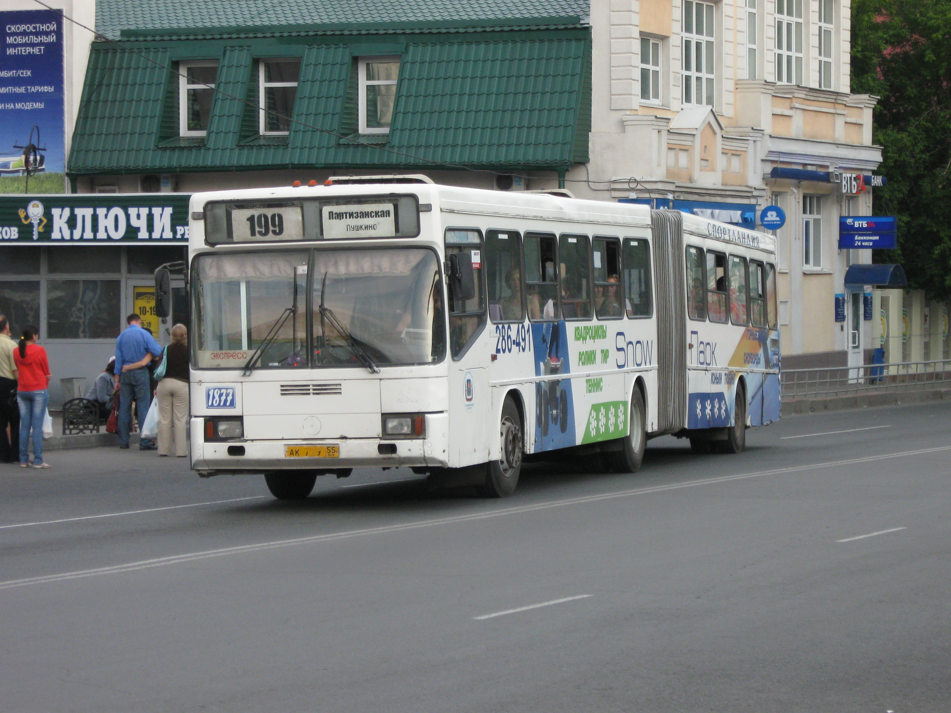 Автобус ГолАЗ АКА-6226 в Омске.